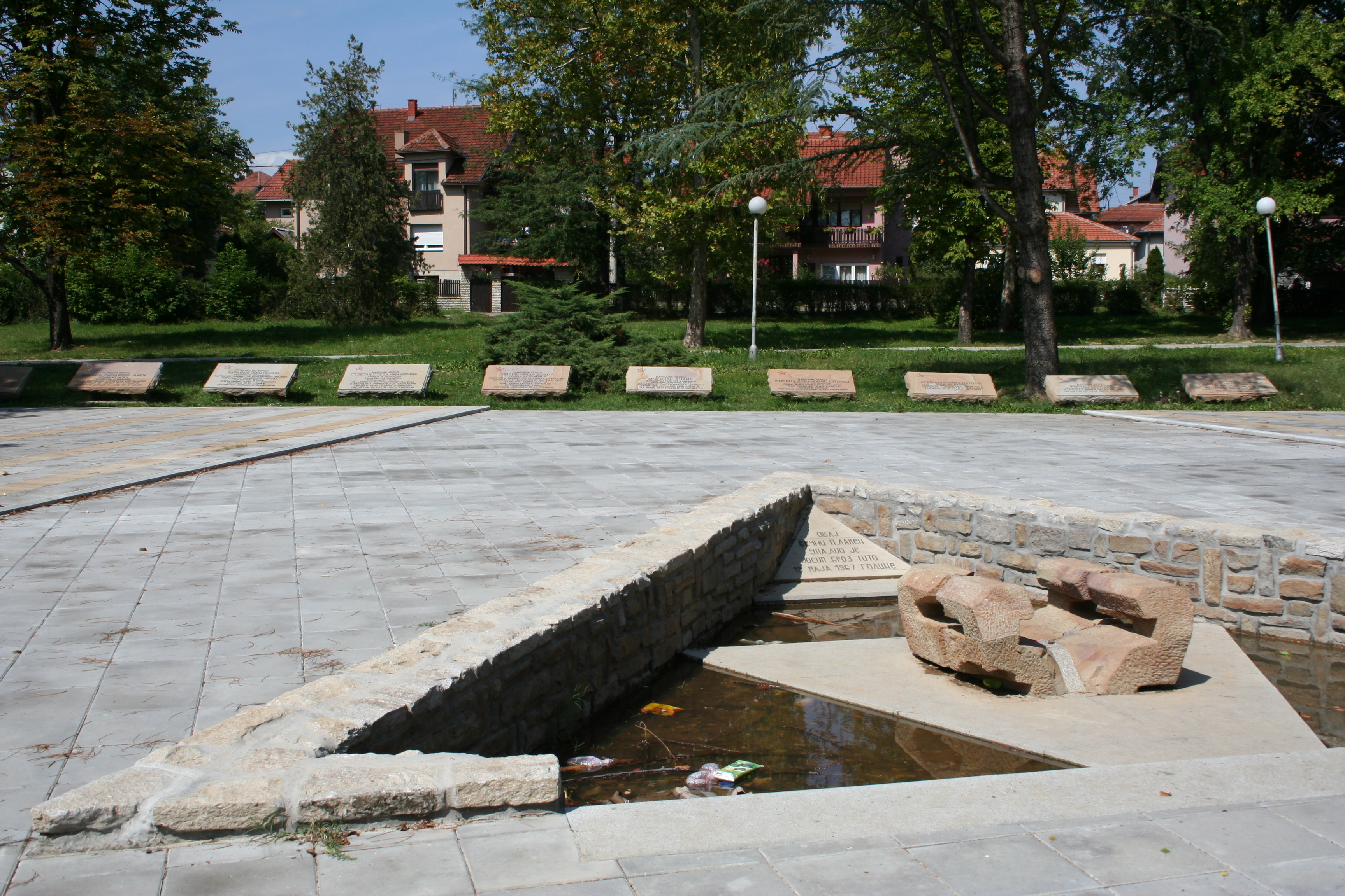 Spomen groblje na Krušiku, Valjevo